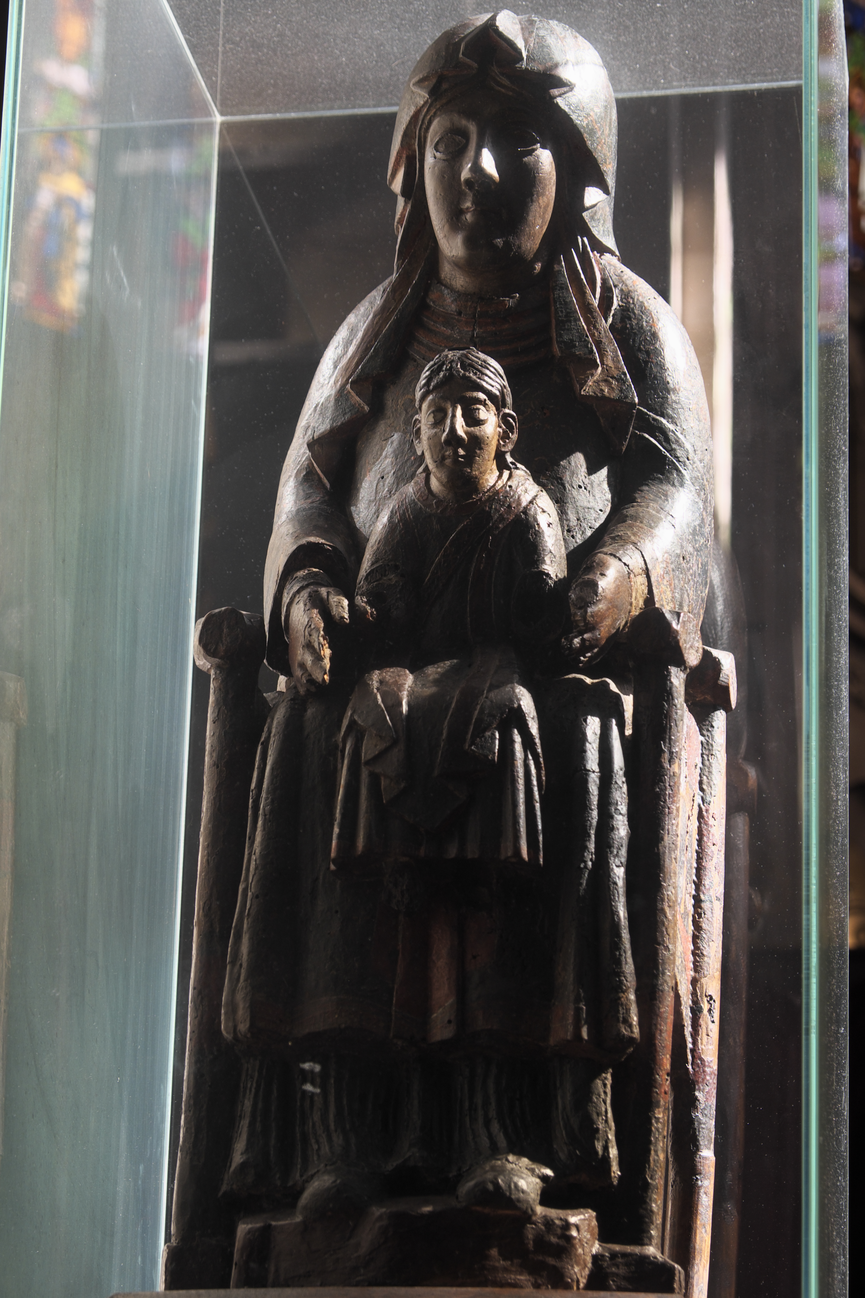 Katholische Pfarrkirche, ehemalige Stiftskirche, Notre-Dame in Beaune im Département Côte-d’Or (Bourgogne-Franche-Comté/Frankreich), Vierge Noire (Schwarze Madonna) aus dem 12./13. Jahrhundert